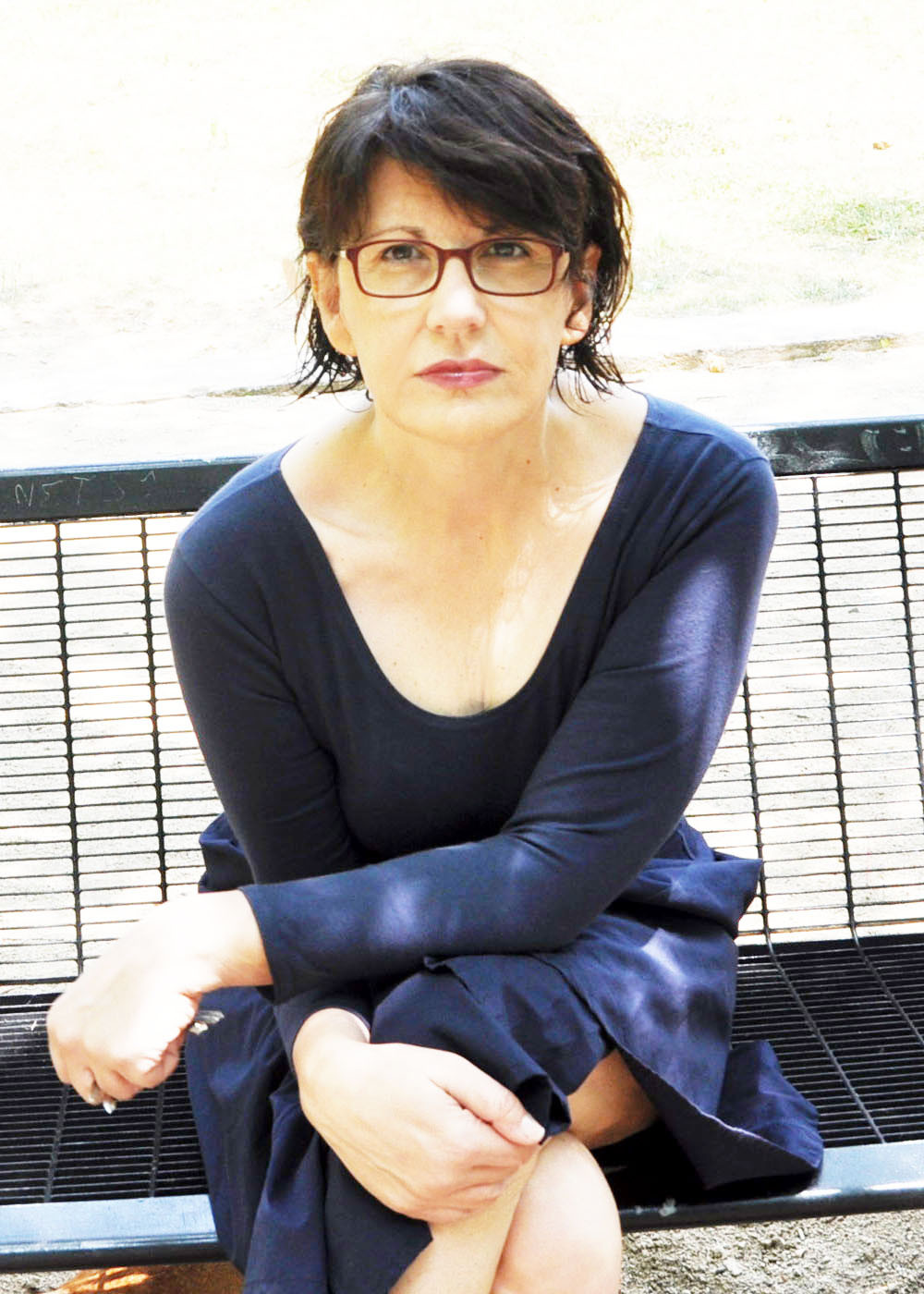 Imma Monsó Junio Premi Nacional de Cultura Any 2013